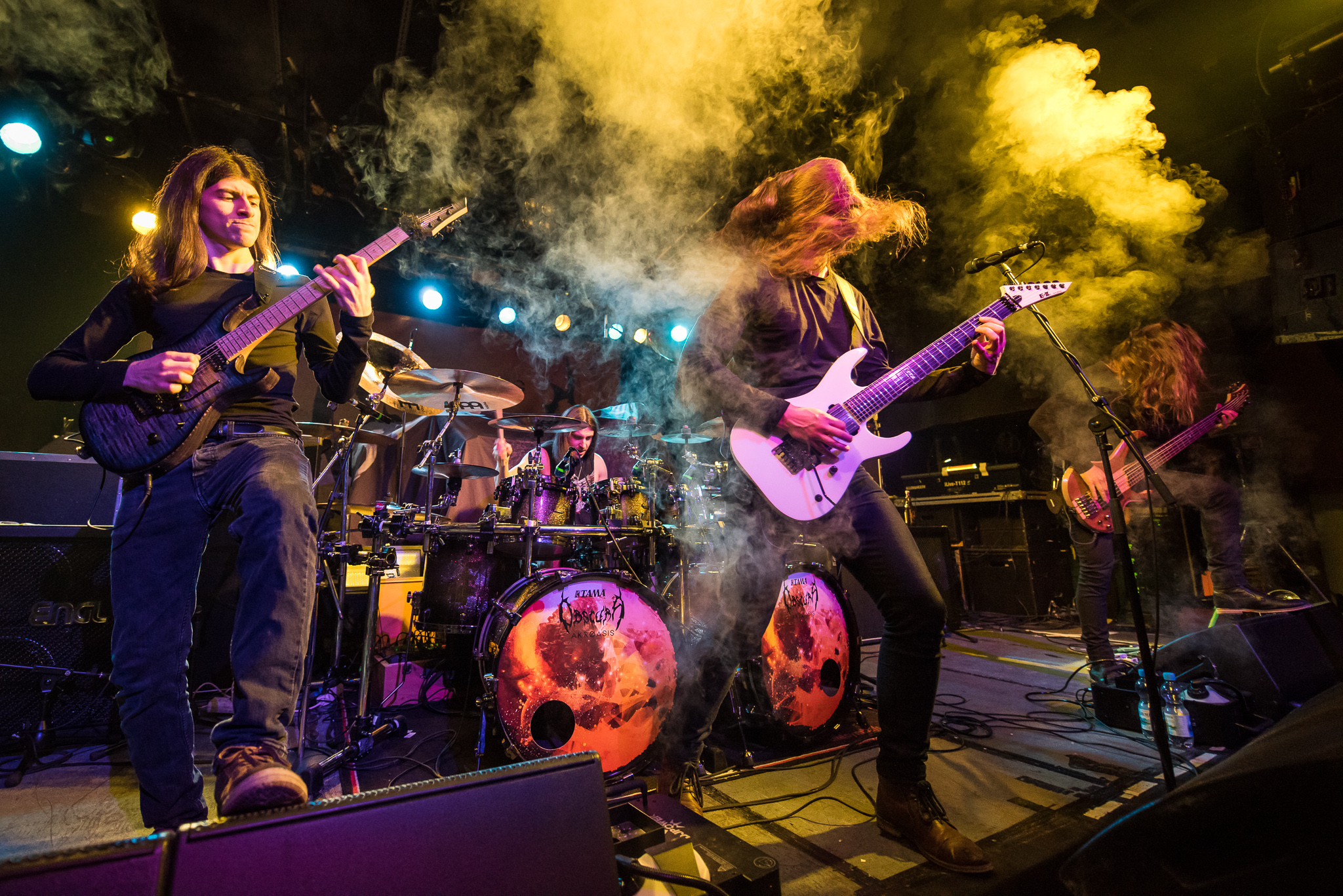 Concertbüro Franken,Der Hirsch,Konzert,Linus Klausenitzer,Livekonzert,Livemusik,Obscura,Rafael Trujillo,Sebastian Lanser,Steffen Kummerer